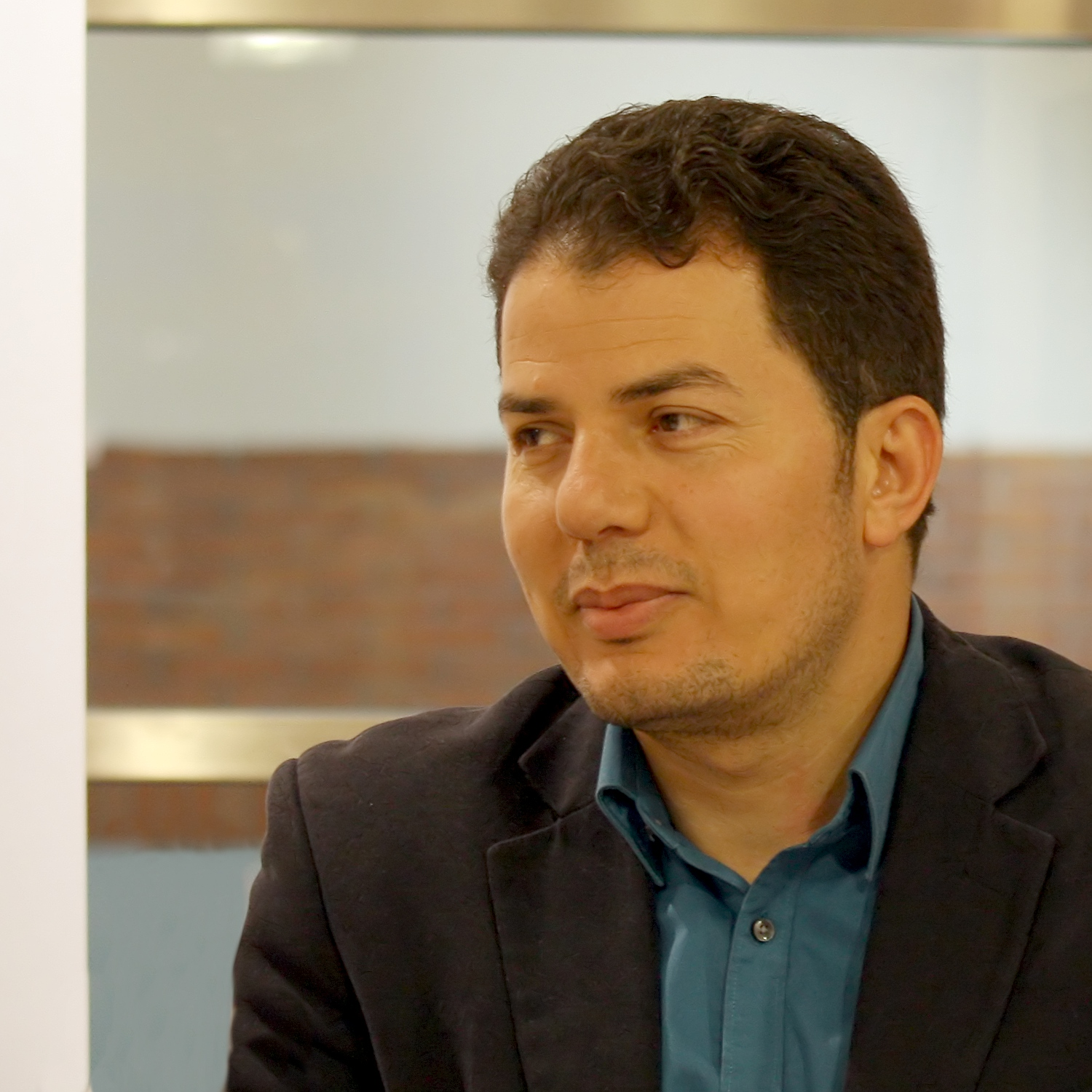 Hamed Abdel-Samad bei der Vorstellung seines Buches Der Untergang der islamischen Welt: Eine Prognose 2010 in der Buchhandlung Ludwig, Hauptbahnhof Köln.